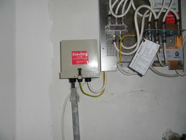 HÜP, geerdet